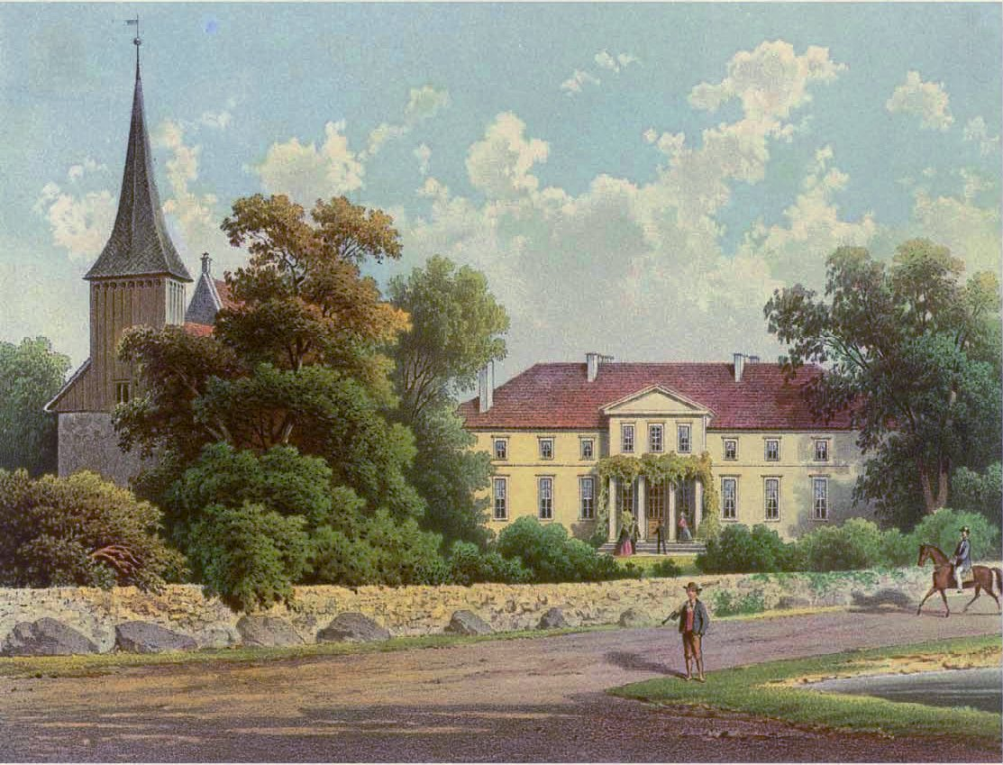 Gut Rollwitz, Kreis Prenzlau, Lithographie von Alexander Duncker, 1869